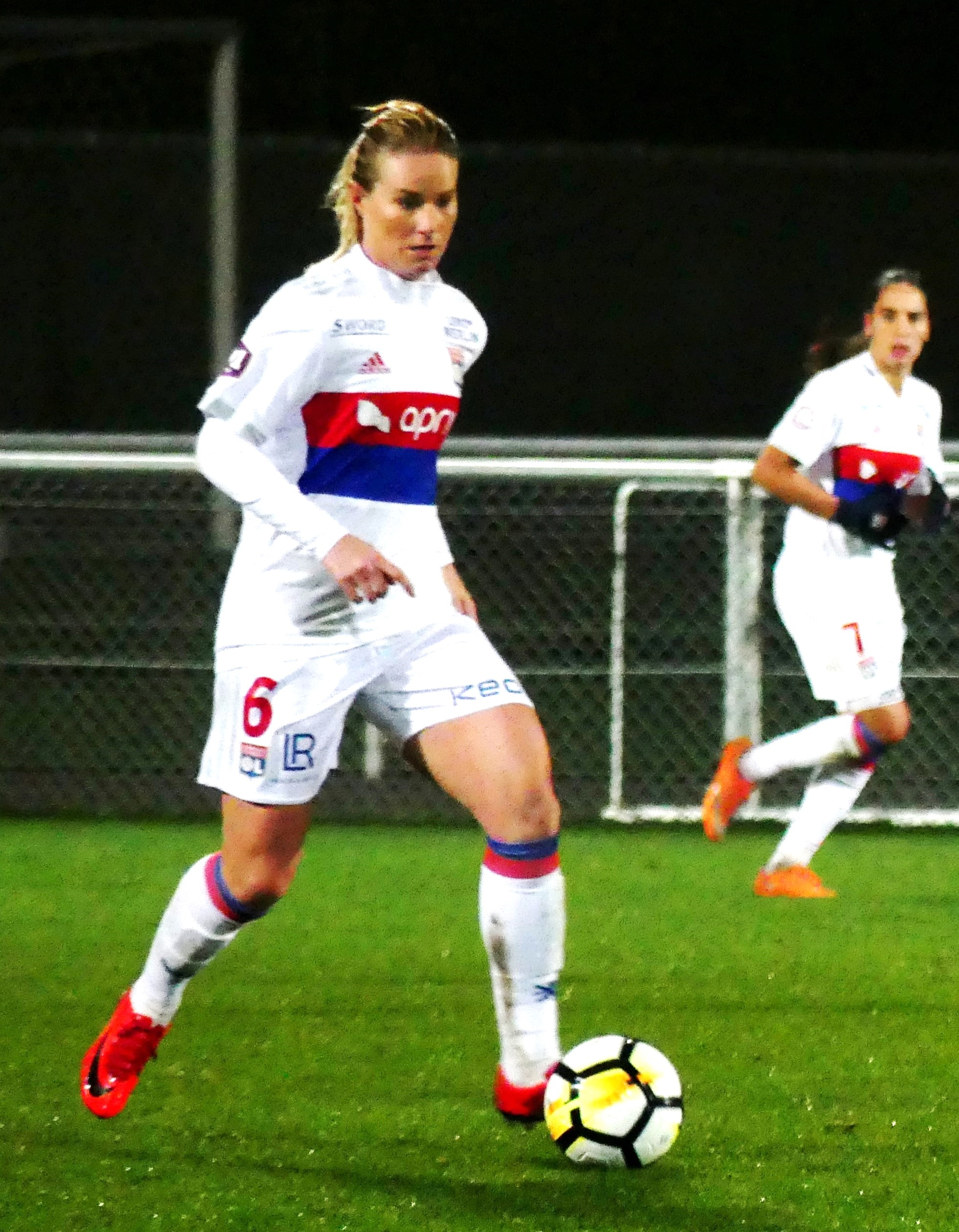 Amandine Henry lors du match contre Montpellier en championnat le 5 février 2018.